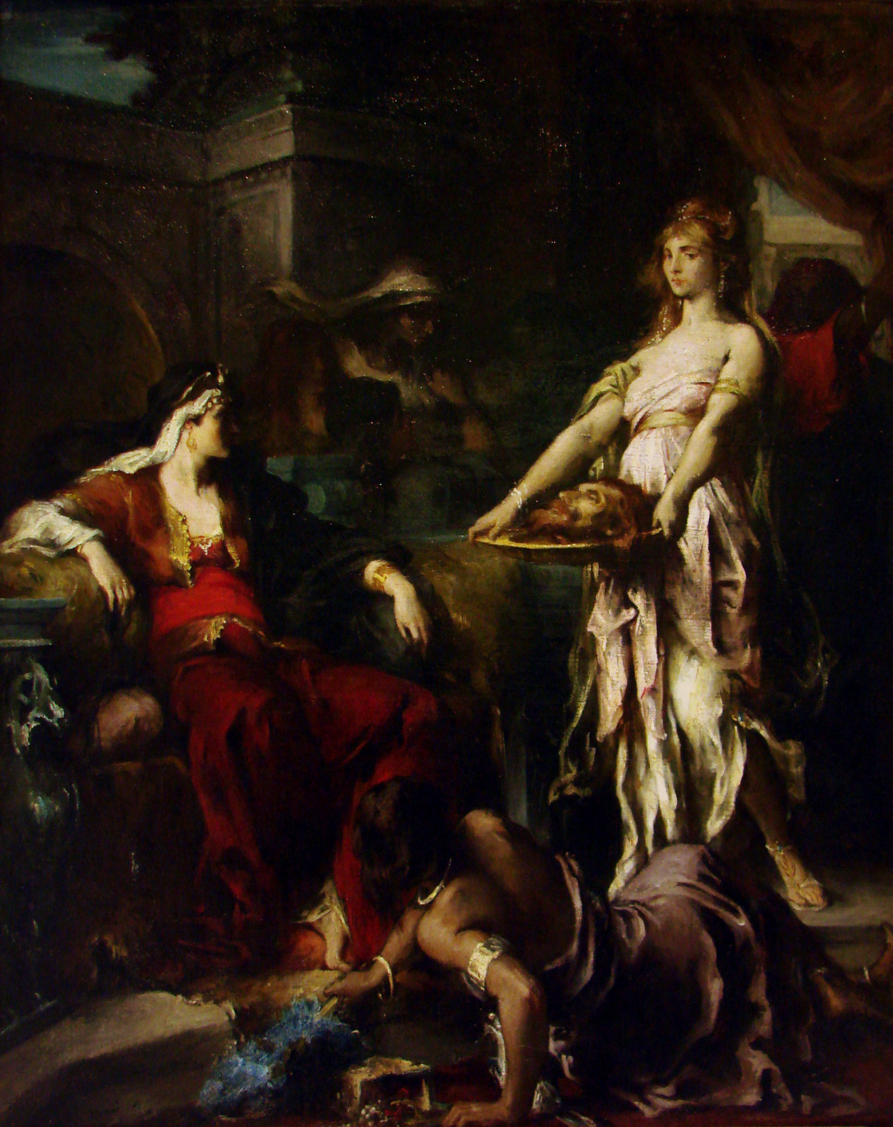 Hérodiade (1872) par Henry Lévy (Nancy 1840 - Paris 1904). Musée des Beaux-Arts de Nancy.